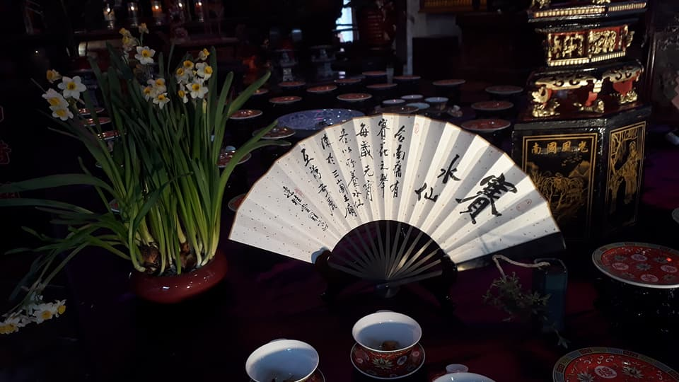 臺南三山國王廟元宵祀宴主題 賽水仙